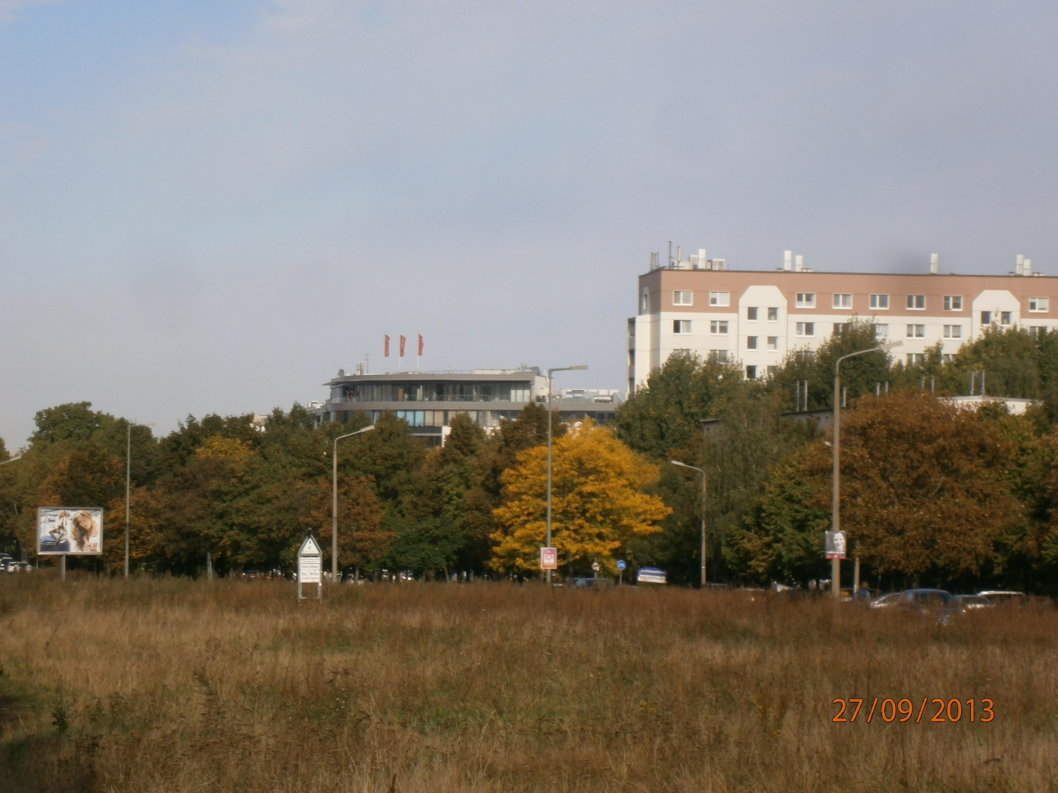 Die Michelangelostraße ist eine Straße im Ortsteil Berlin-Prenzlauer Berg. Hier der Blick von der Grünfläche südlich der Straße nach Westen.